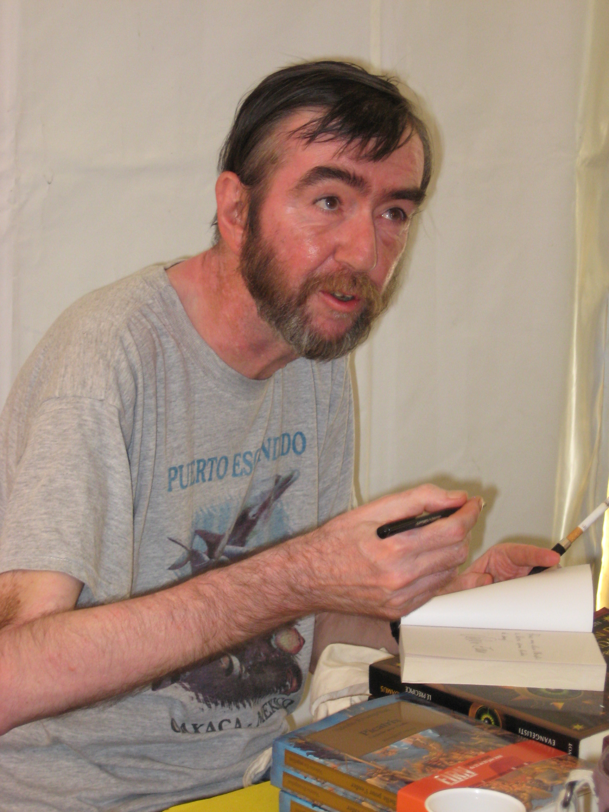 Valerio Evangelisti pris en photo par Jean-Marie DAVID lors du Festival International du roman Noir de Frontignan (France), le 29 juin 2008